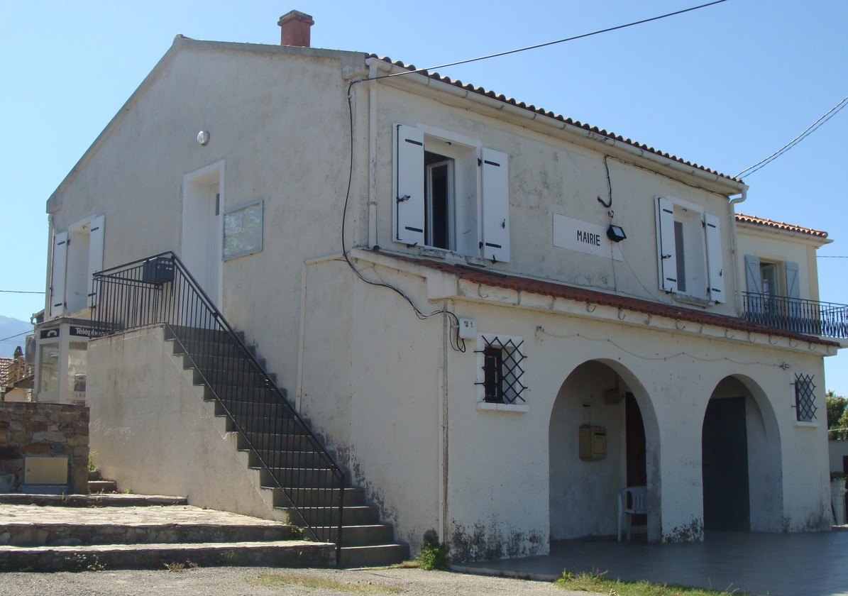 La mairie de Serra-di-Fiumorbo.